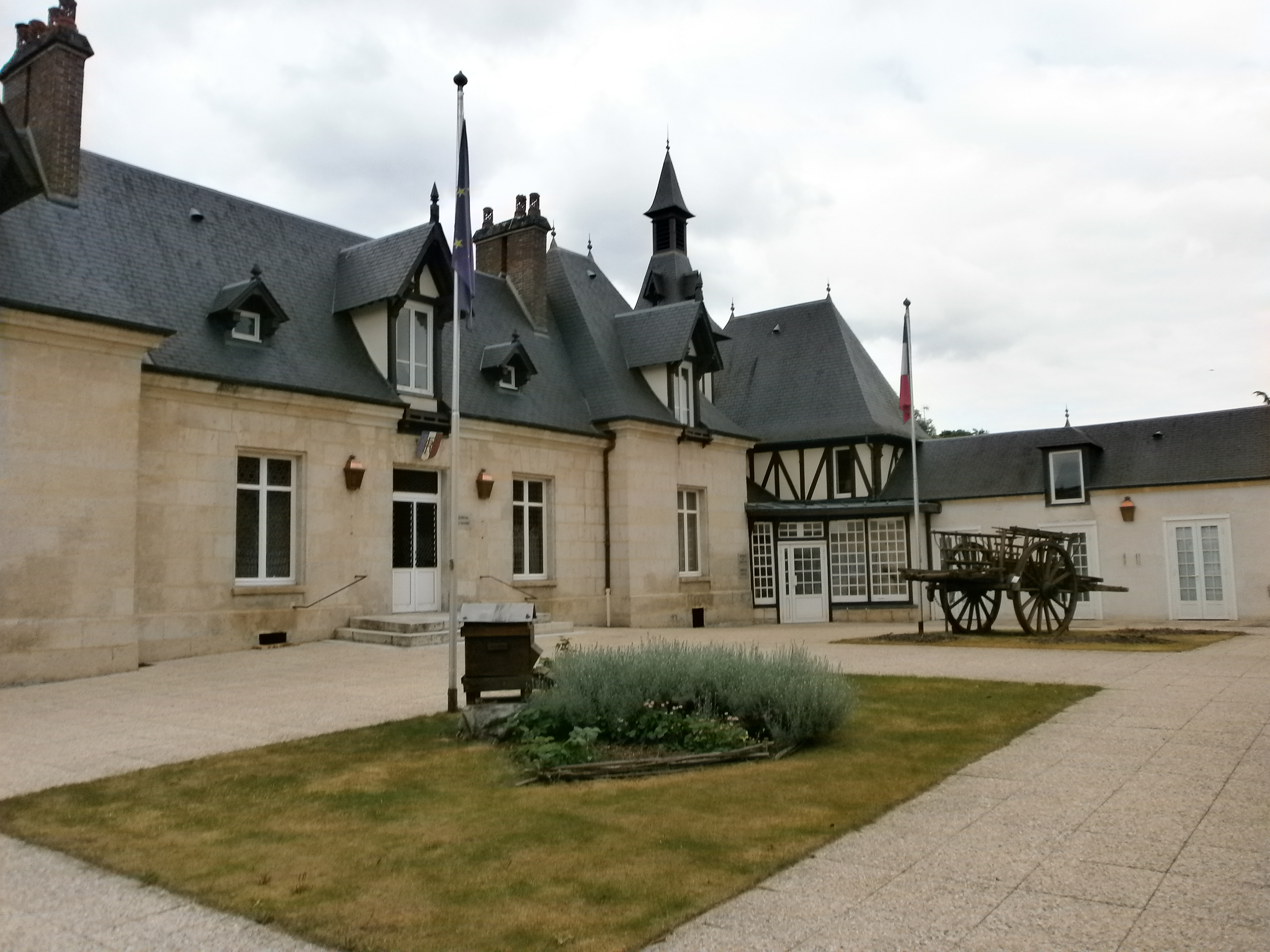 Mairie de Clairoix.